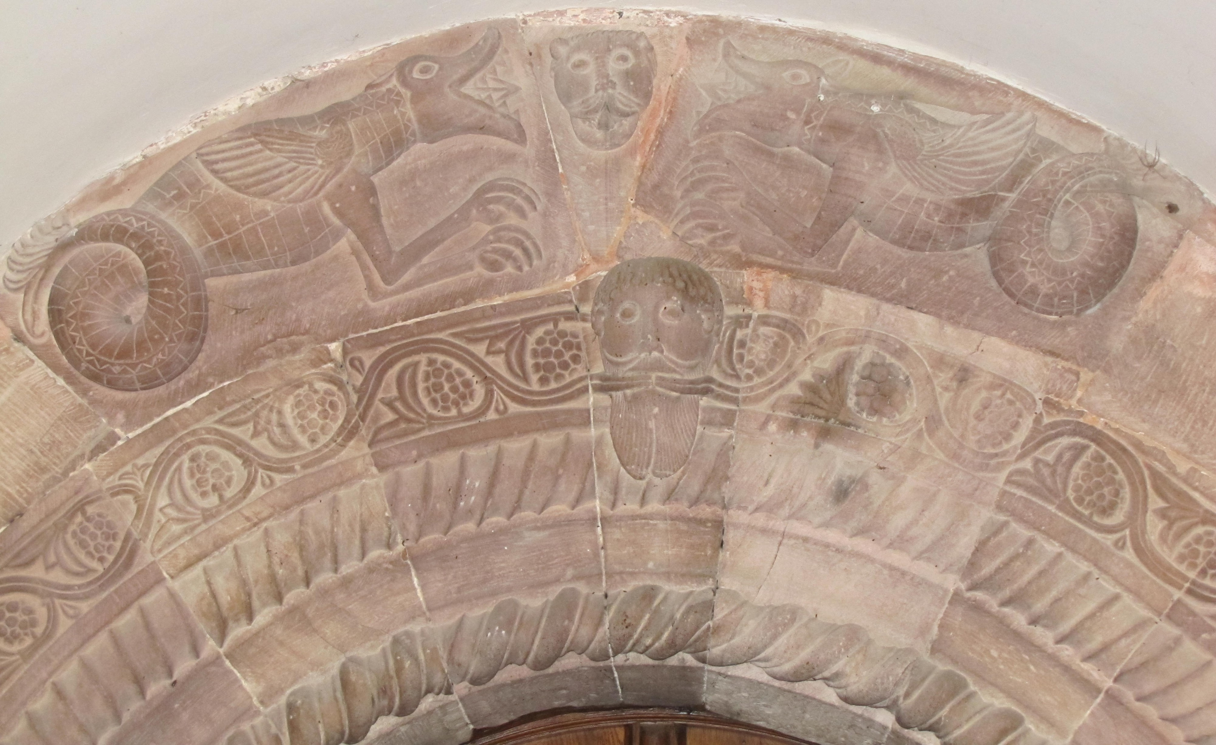 Alsace, Bas-Rhin, Église protestante Saint-Laurent de Dorlisheim (PA00084695, IA67011177). Reliefs romans sur le portail principal